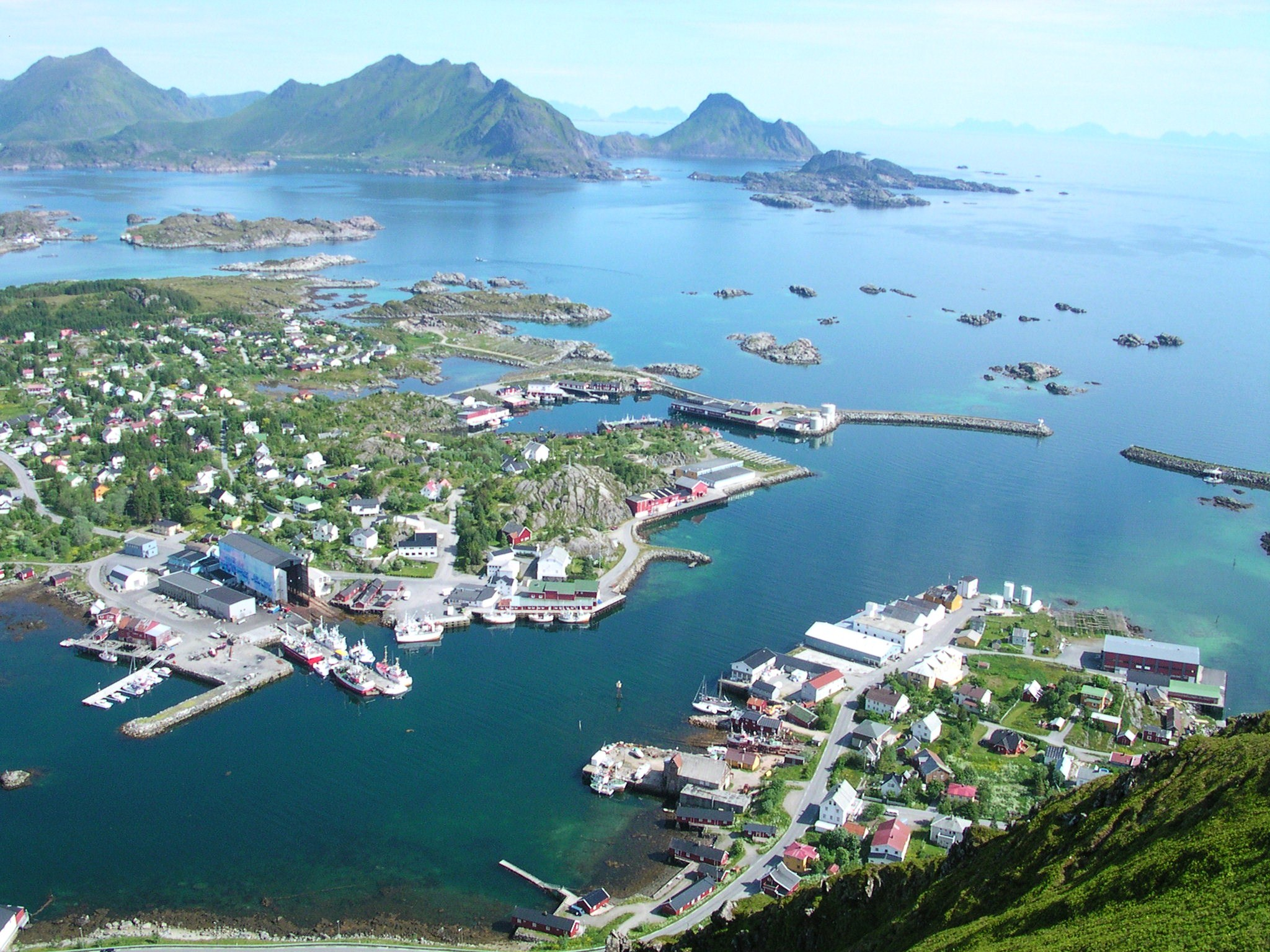 Ballstad i Lofoten - bildet tatt fra Ballstadheia